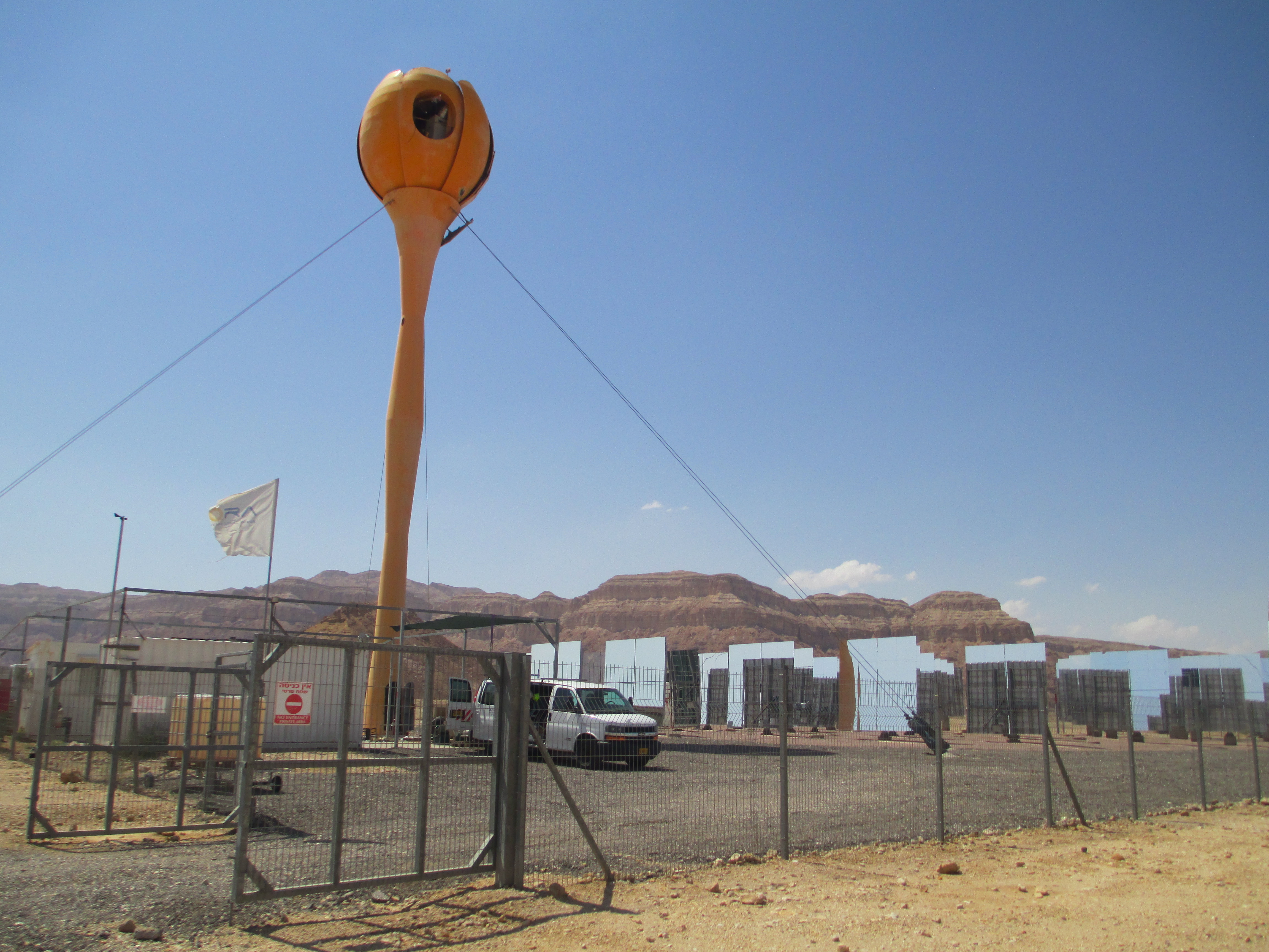 מגדל השמש בקיבוץ סמר